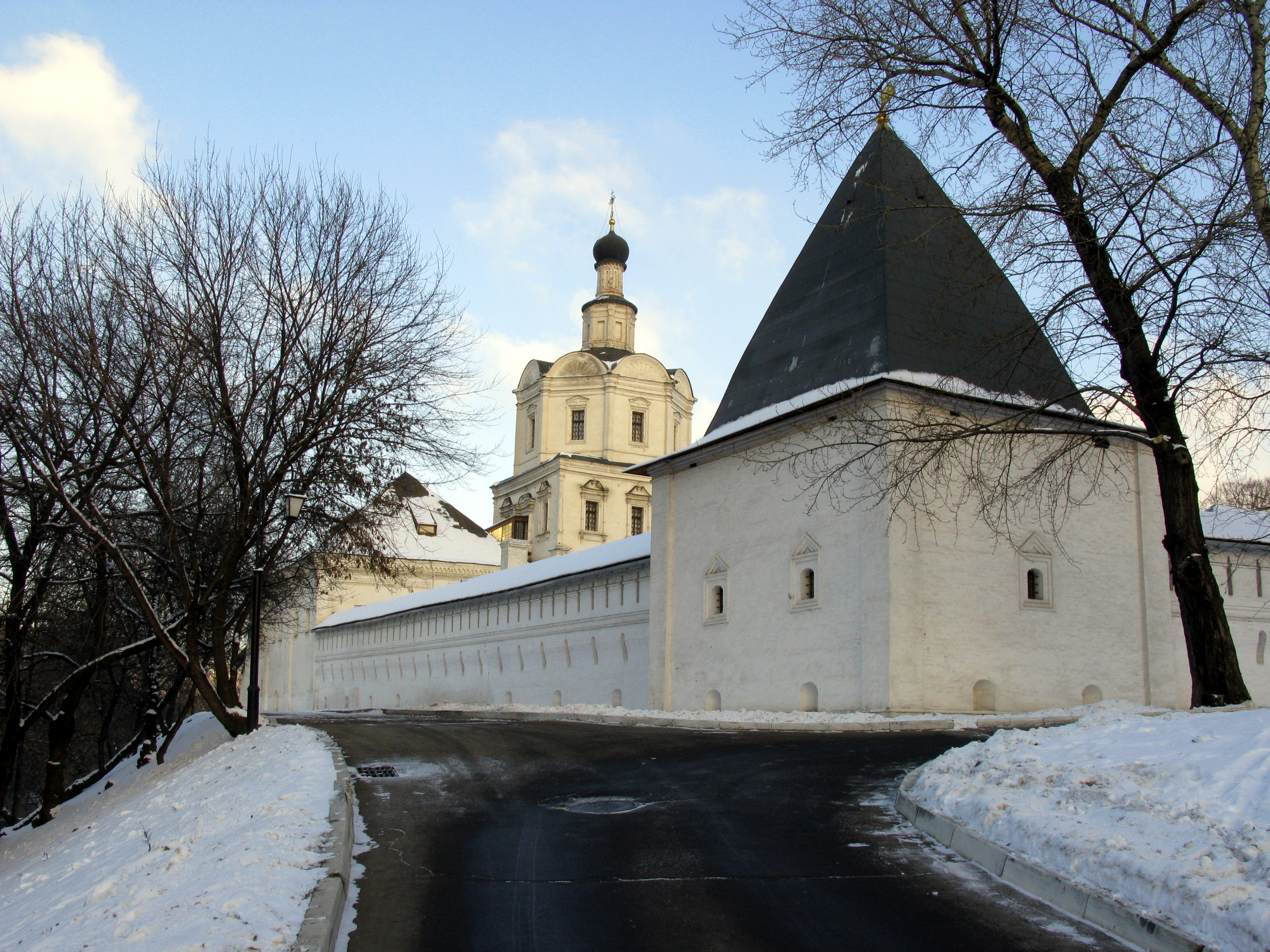 Андроников монастырь